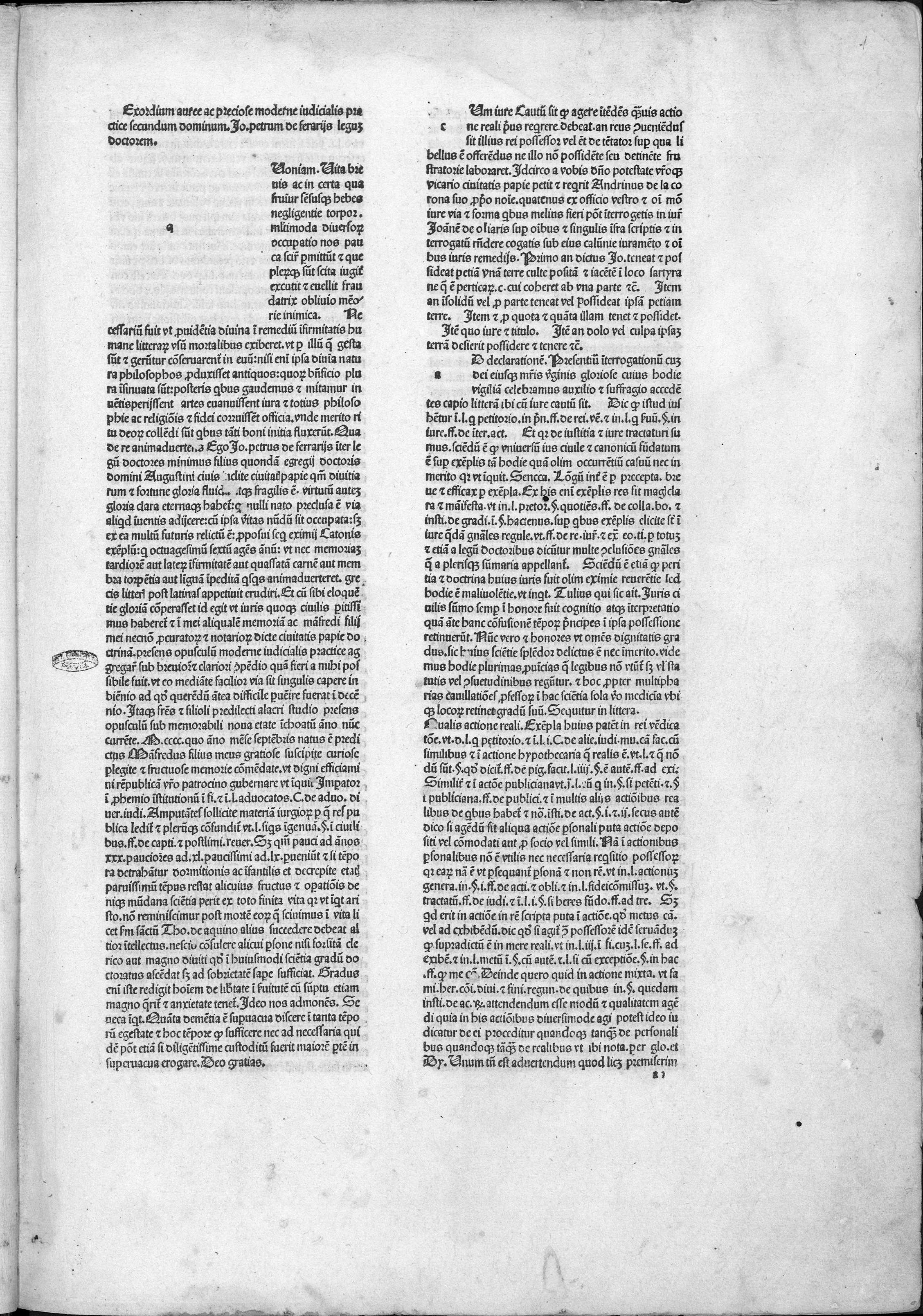 Frontespizio